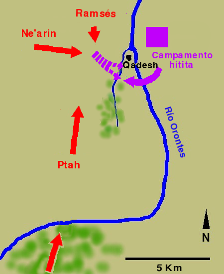 Mapa Qadesh